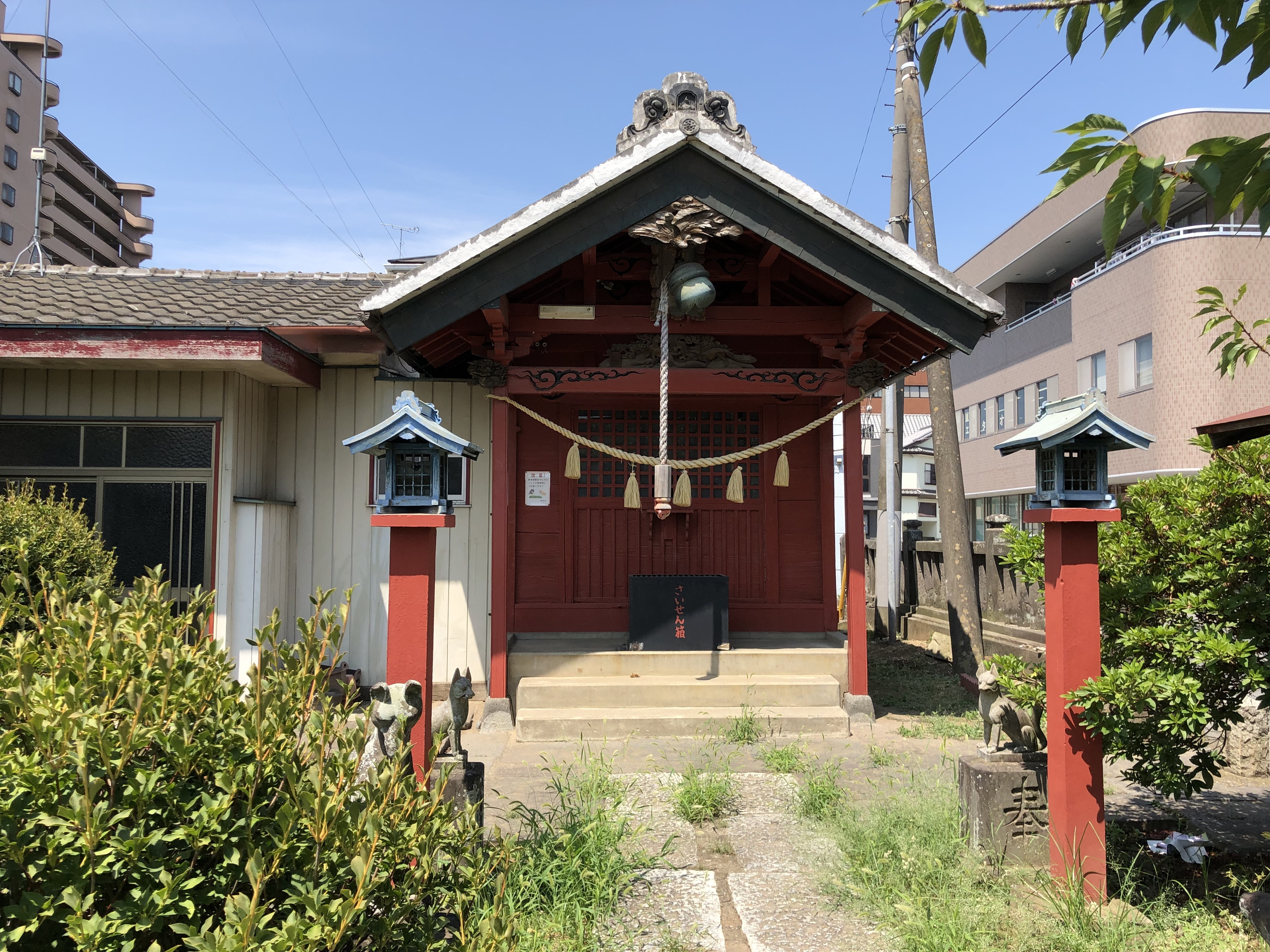 館林宵稲荷神社、拝殿